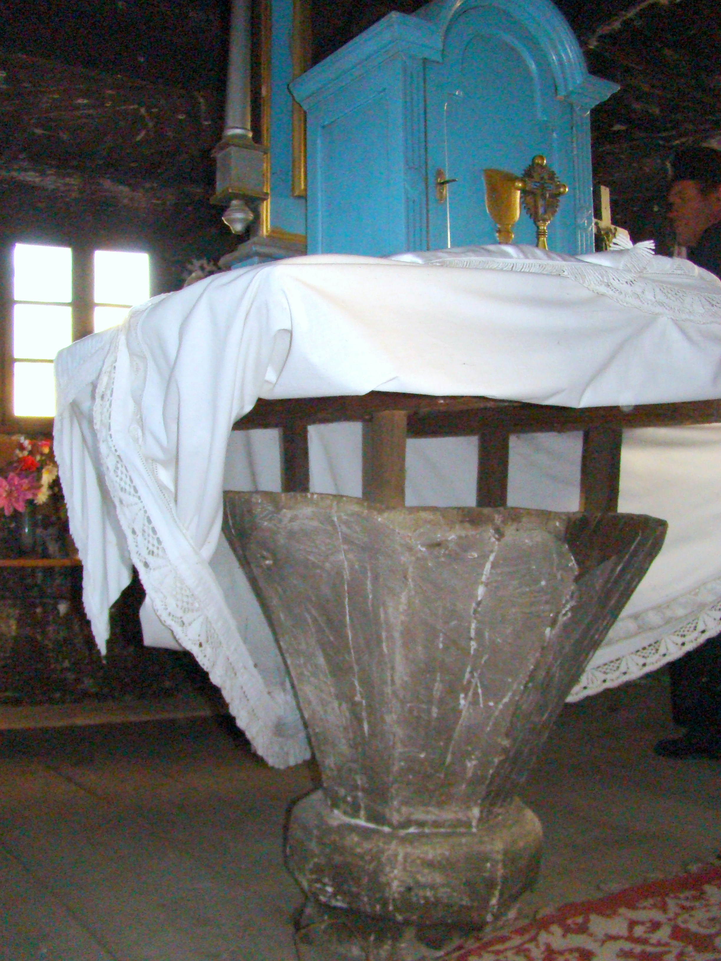 Biserica de lemn "Sfinții Arhangheli Mihail şi Gavriil" din Chieșd, județul Sălaj